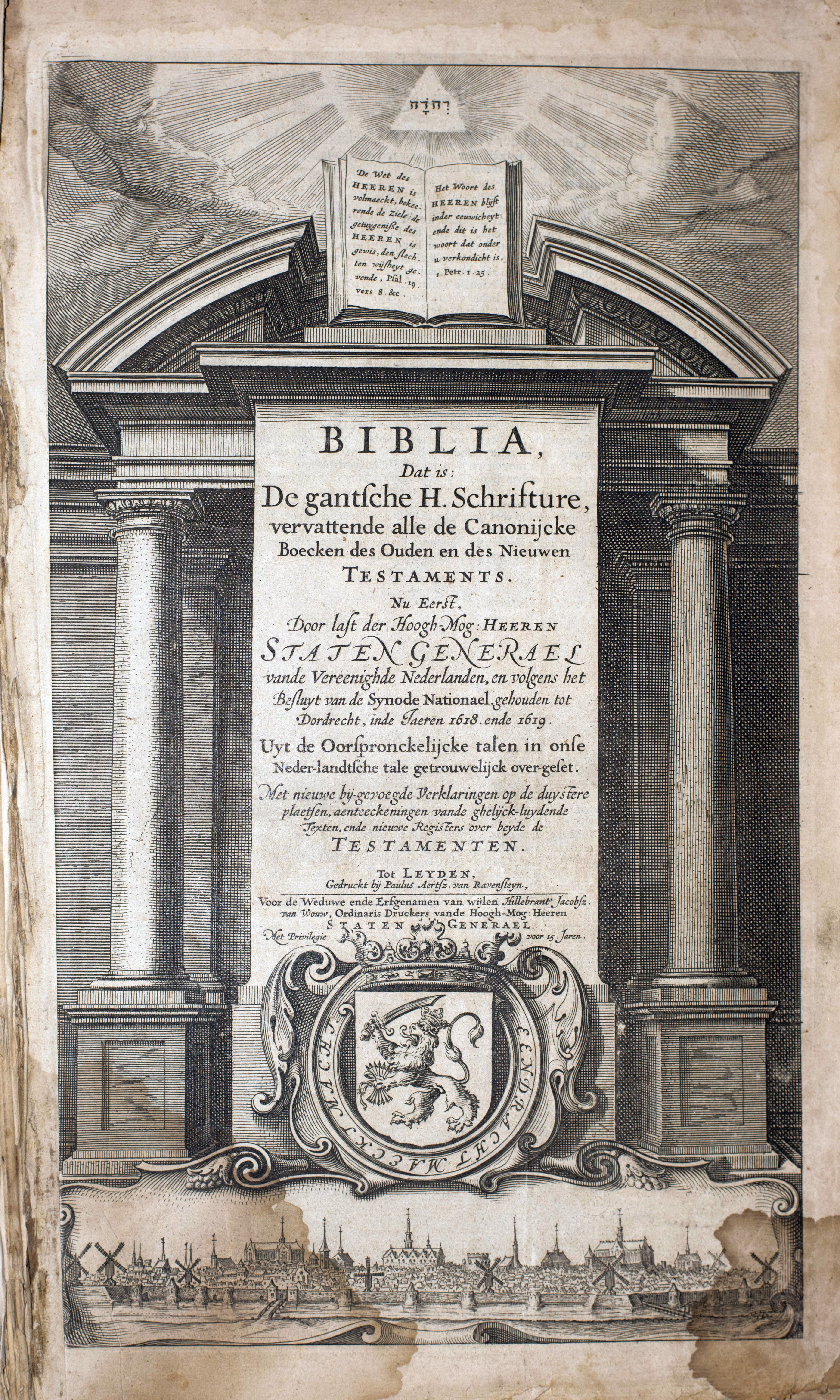 Titelblad van een Statenbijbel